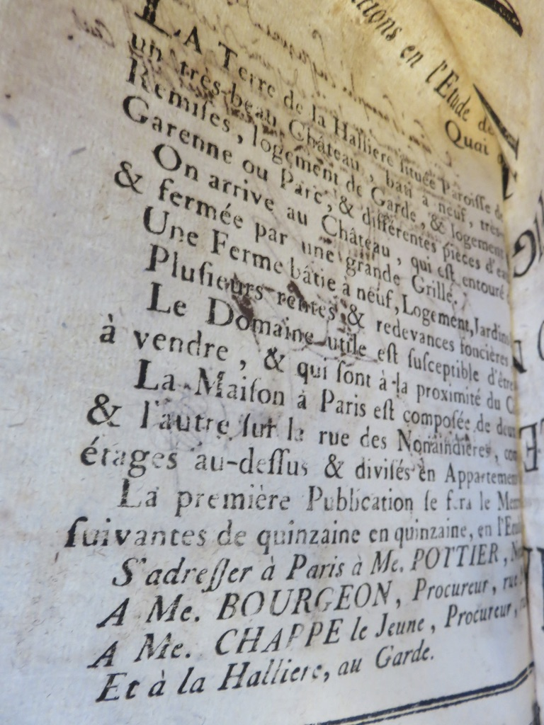 La Hallière est adjugée au plus offrant, en l'occurence à M. Testu de Balincourt.